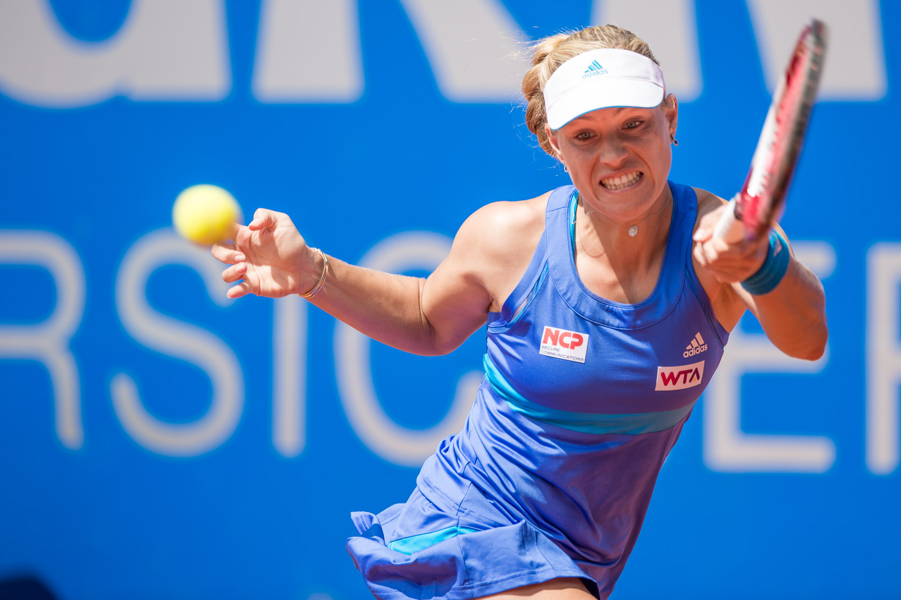 Angelique Kerber,Damentennis,Nürnberger Versicherungscup 2014,Tennis,WTA